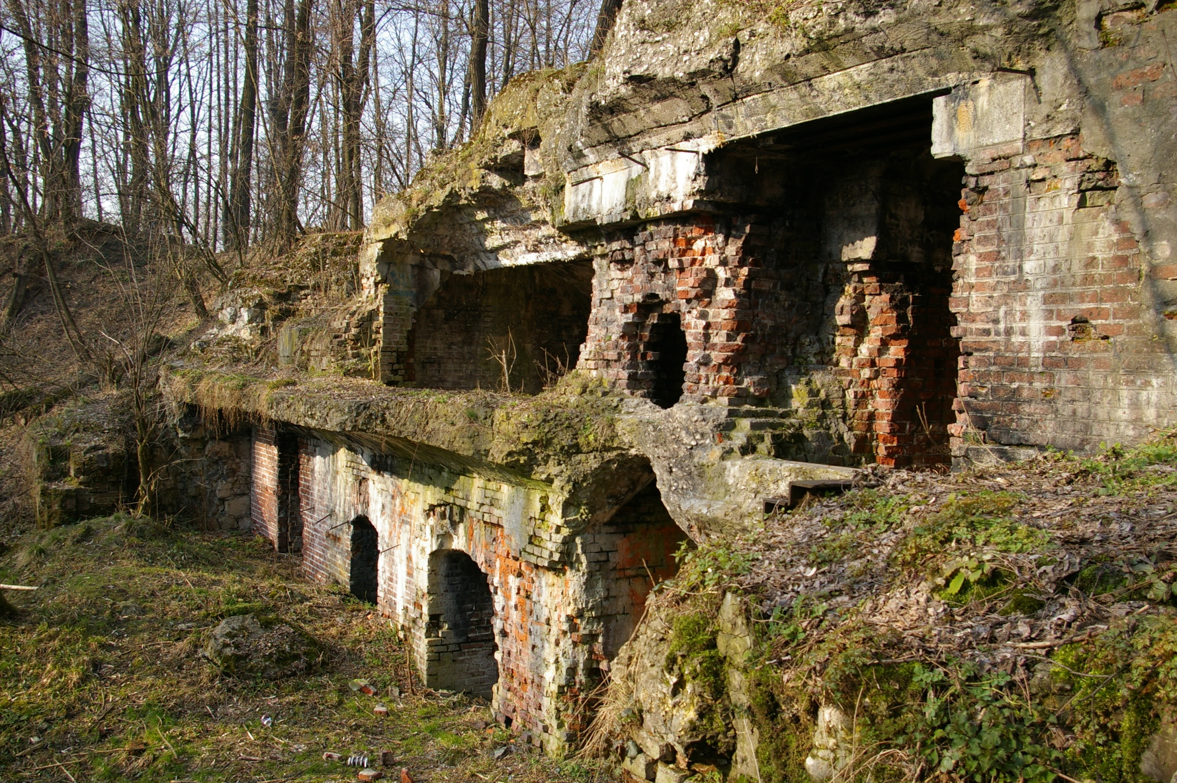 Fort pancerny pomocniczy 47 ½ Sudół, Kraków